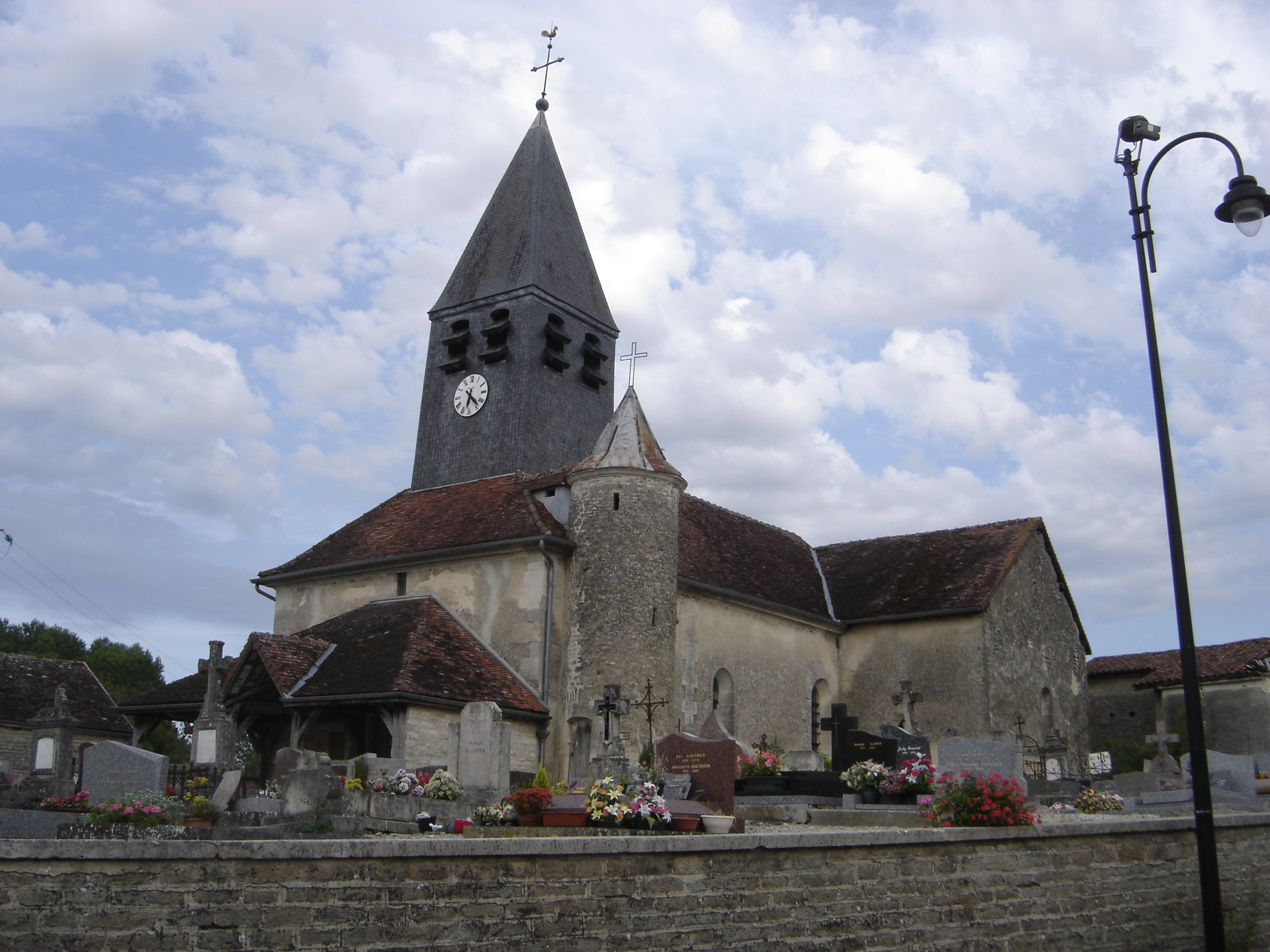 église Saint Symphorien d'Unienville - Aube - France